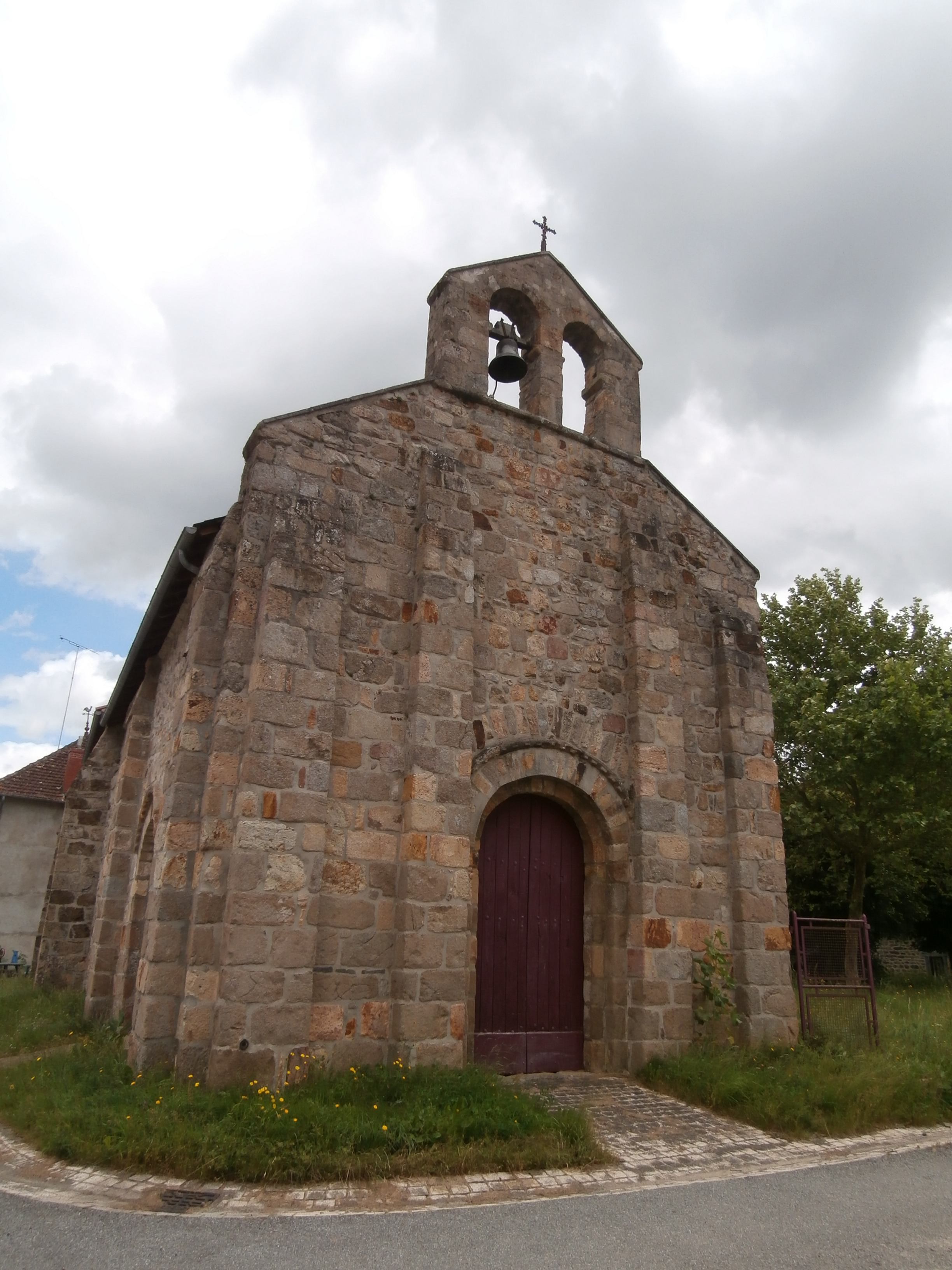 Eglise du XIIe siècle